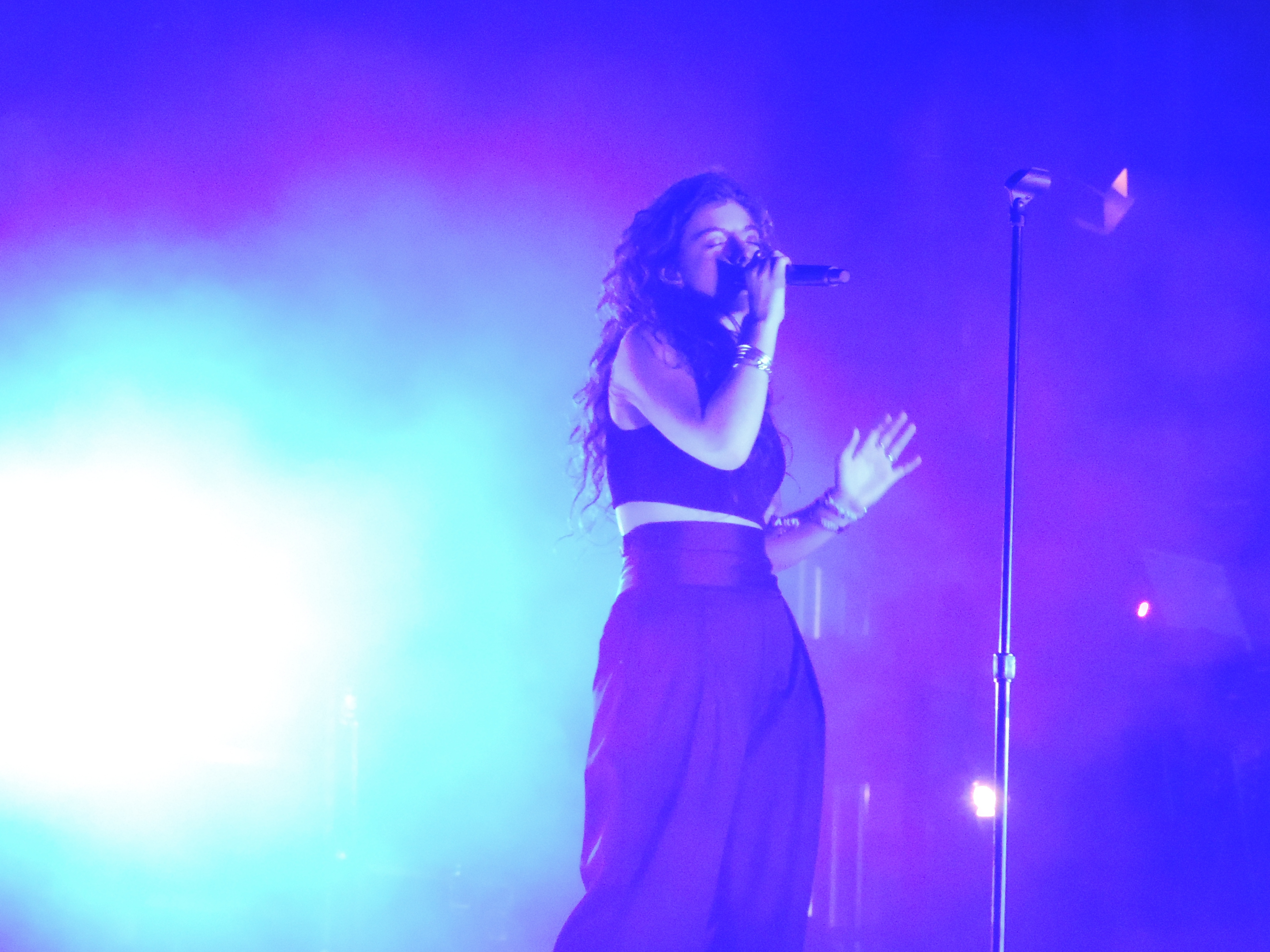 Lorde